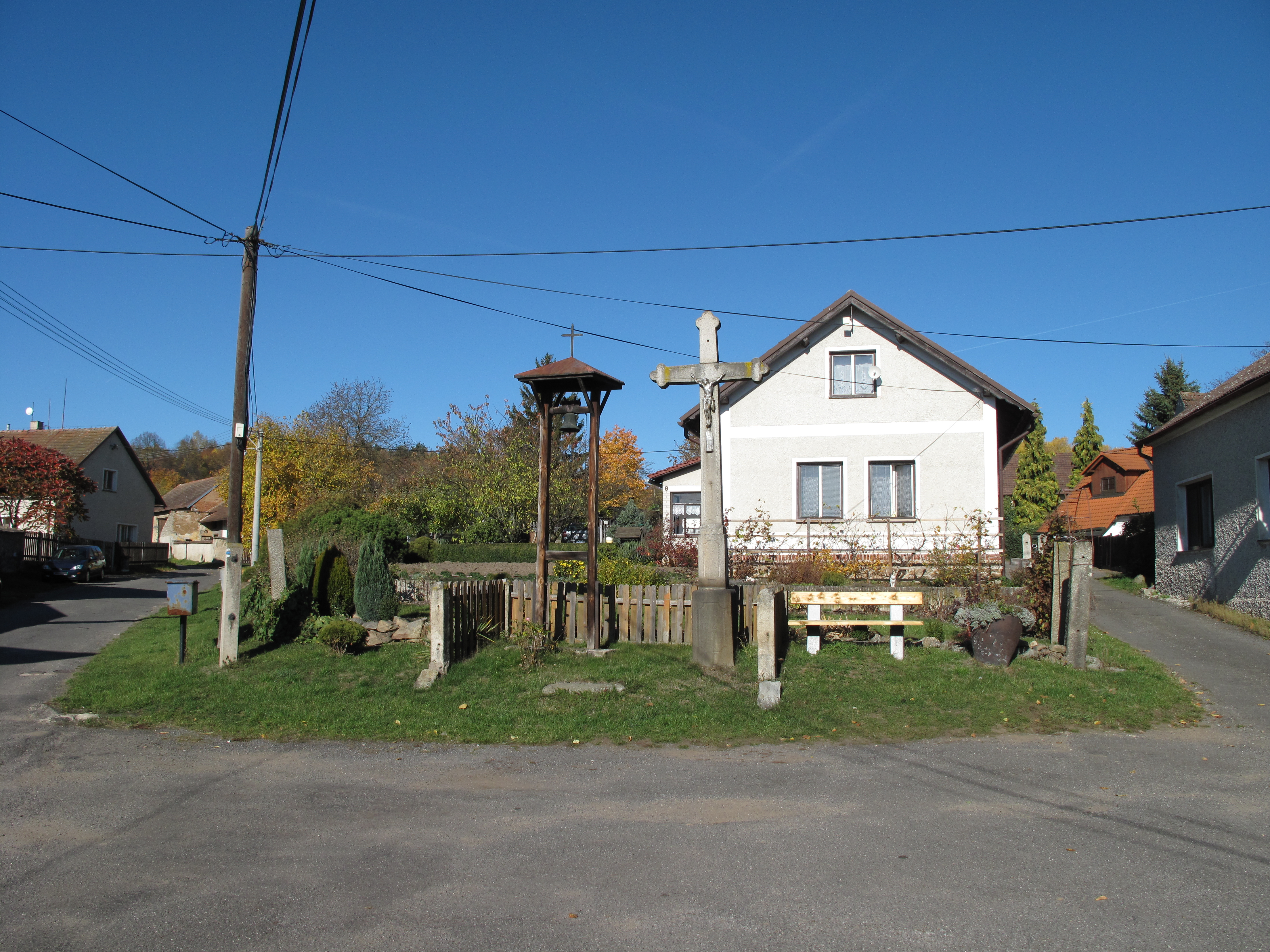 Křížek ve Vrančicích. Okres Příbram, Česká republika.